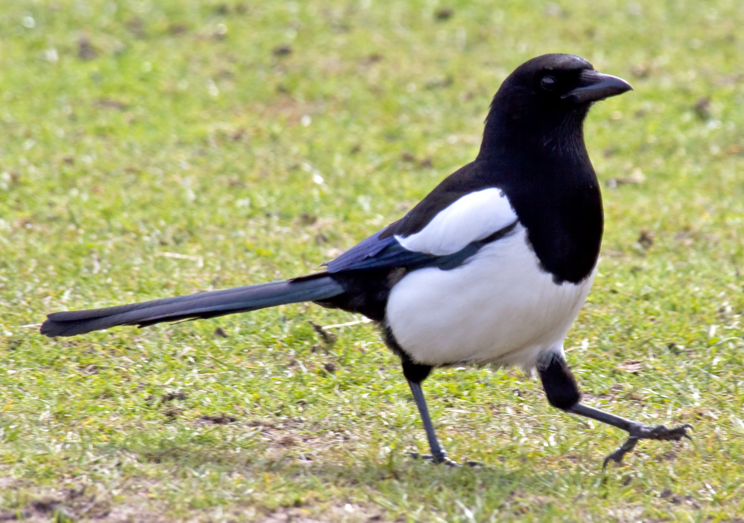 Magpie